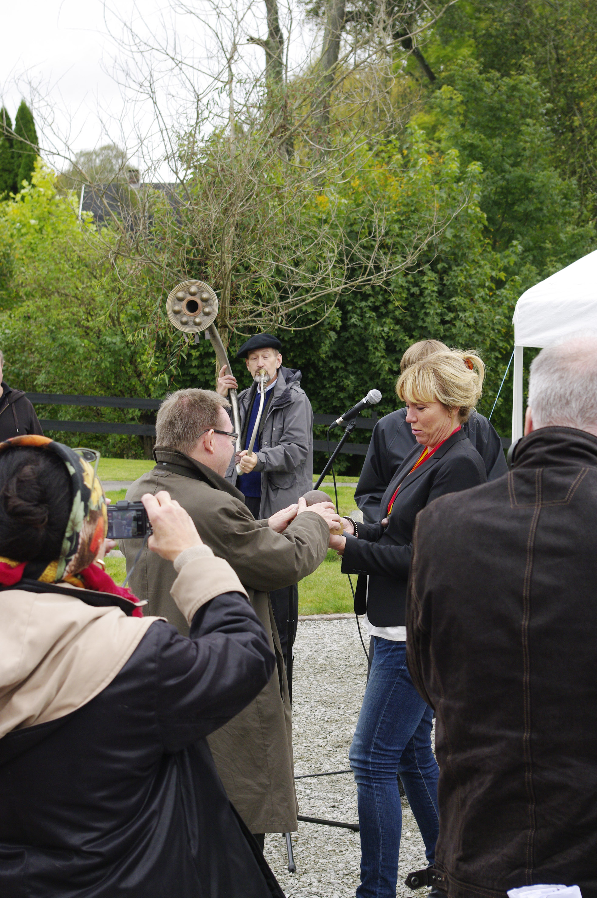 Pristagaren i Årets Medelpunkt 2012, Höör, Sverige.